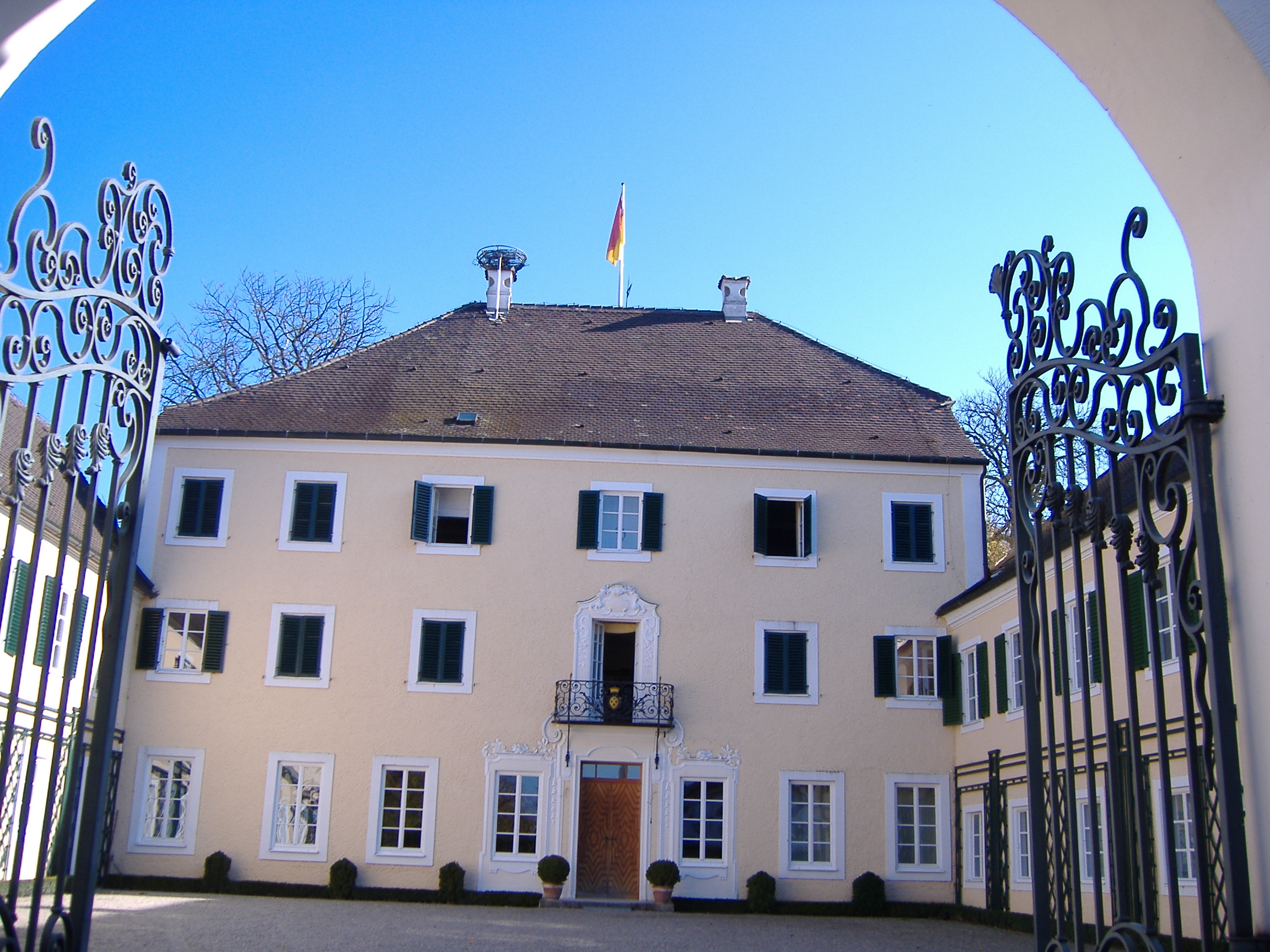 Stepperg